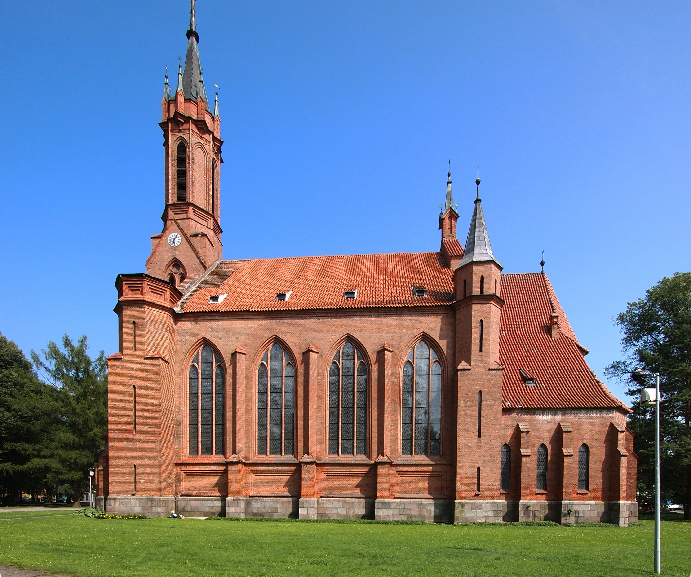 epl110_8060978